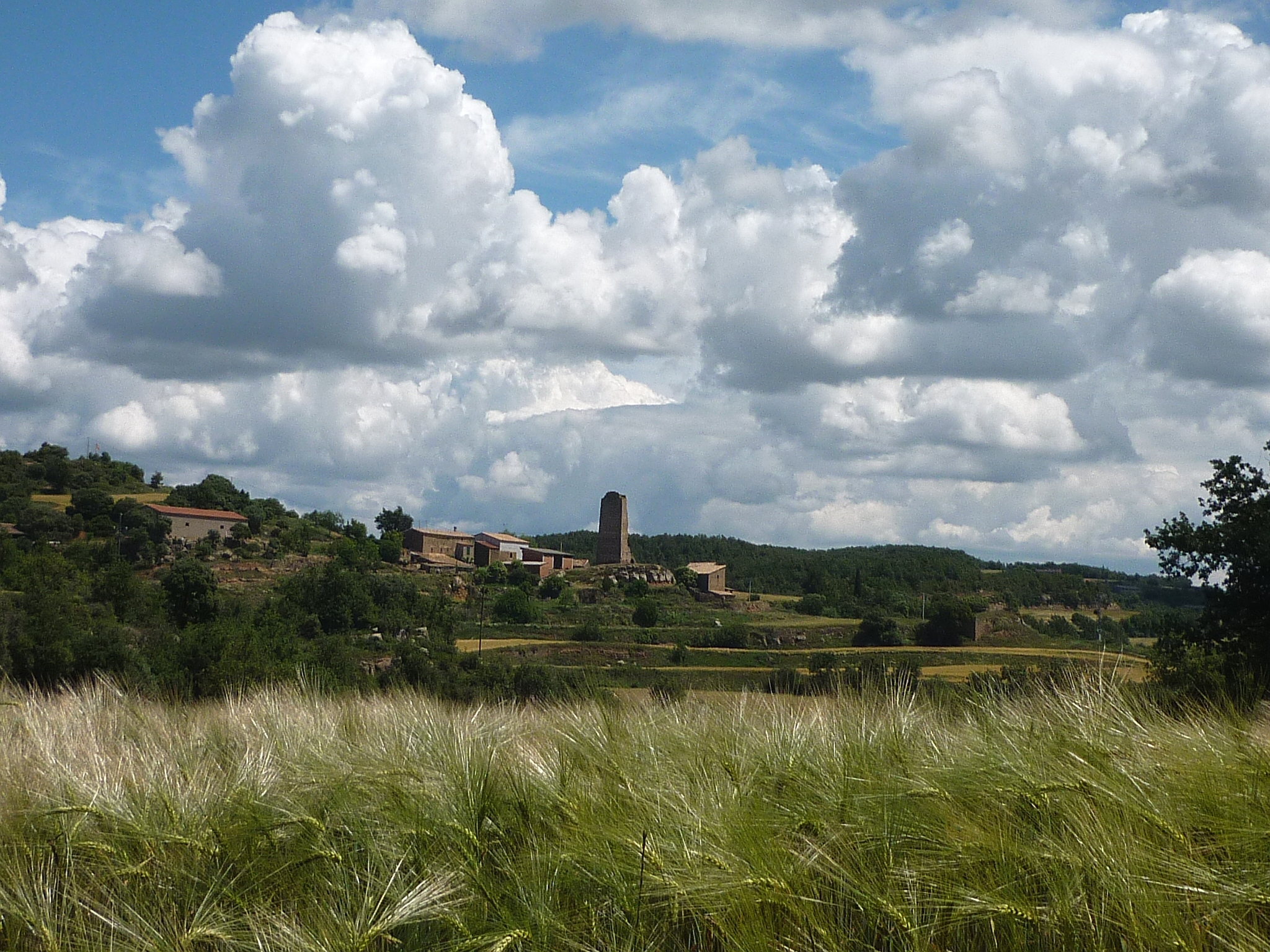 Torre de Peracamps (Llobera): Vista general del poble